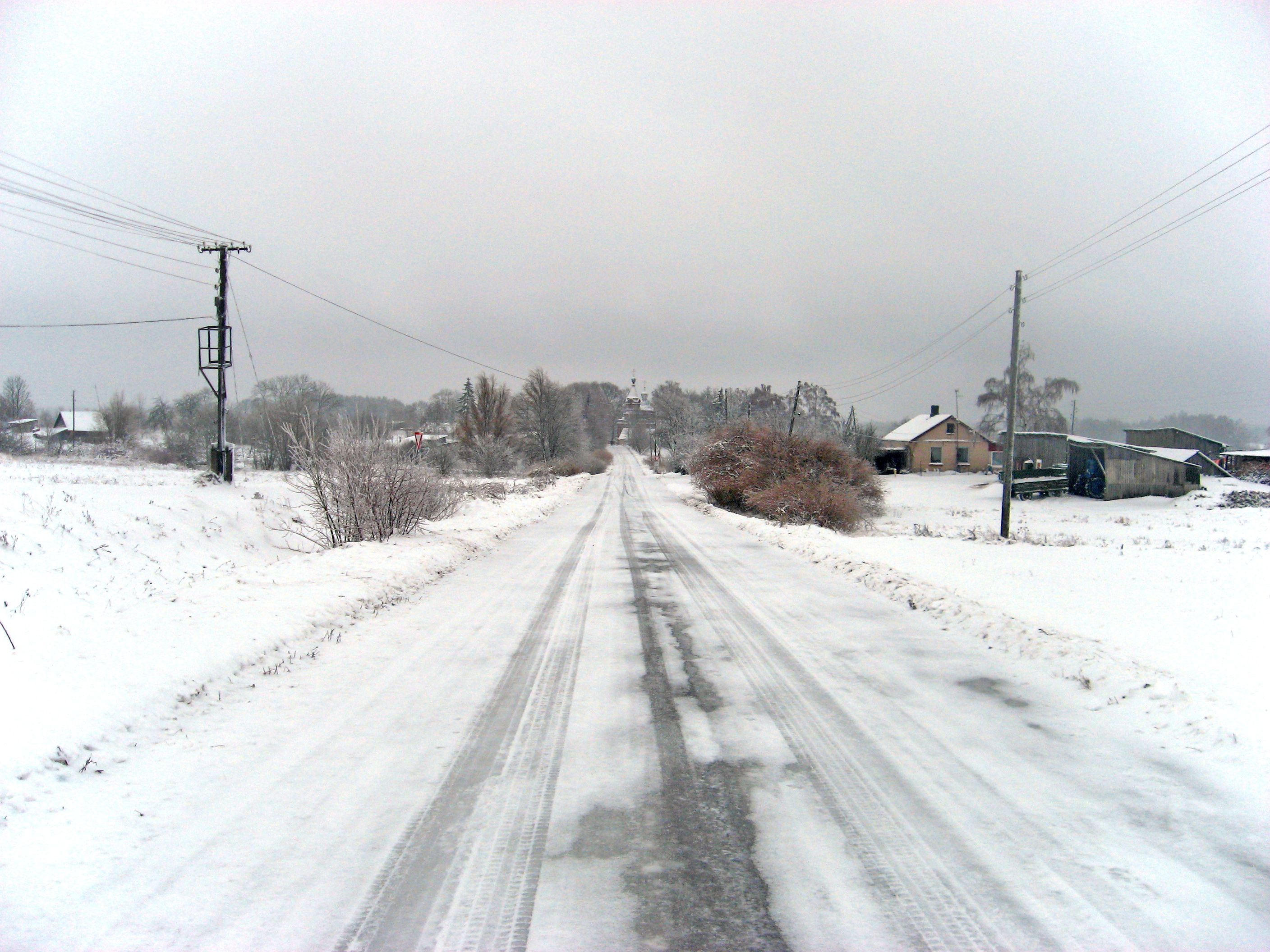 Липинишки